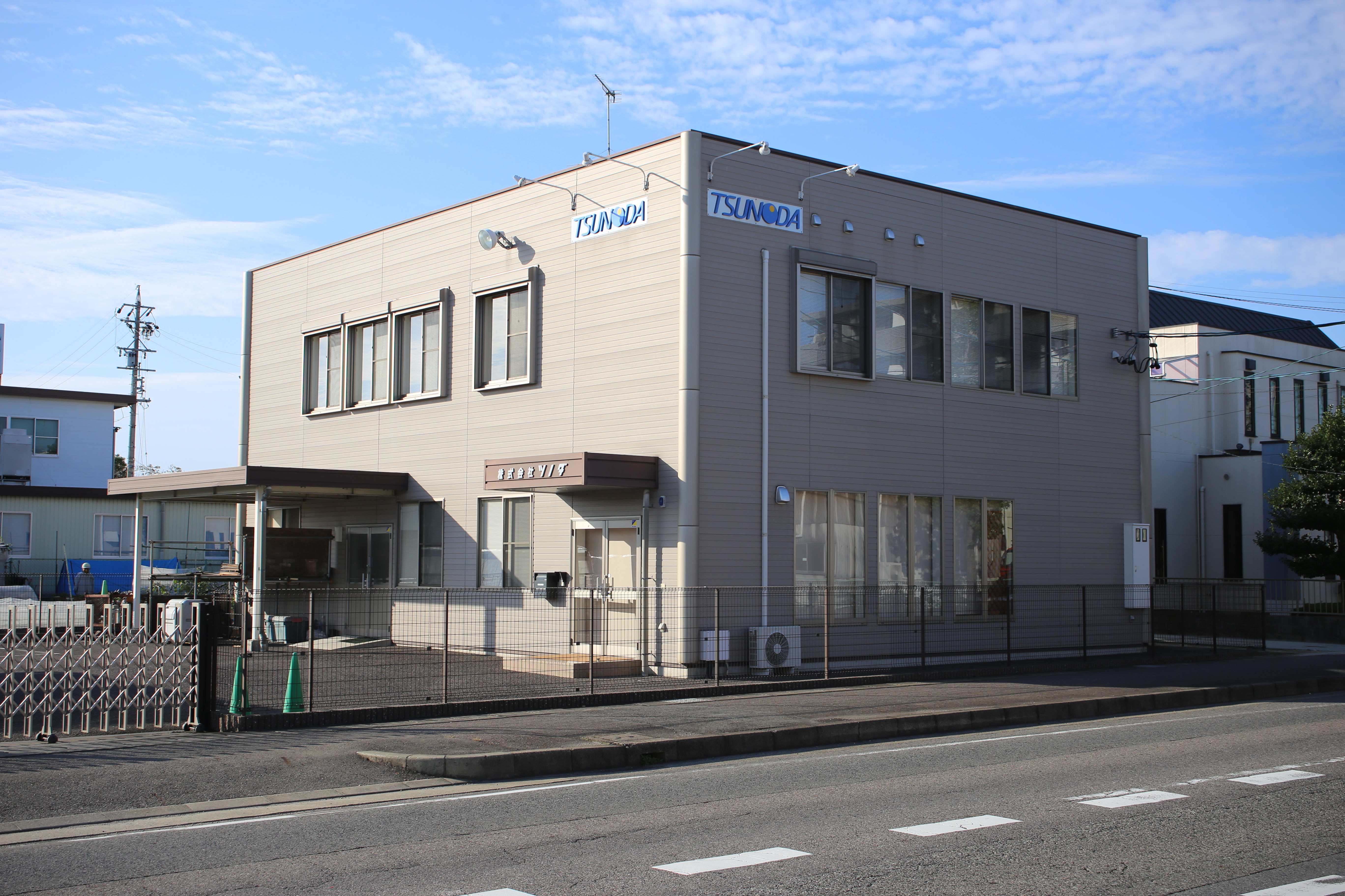 愛知県小牧市のツノダ本社